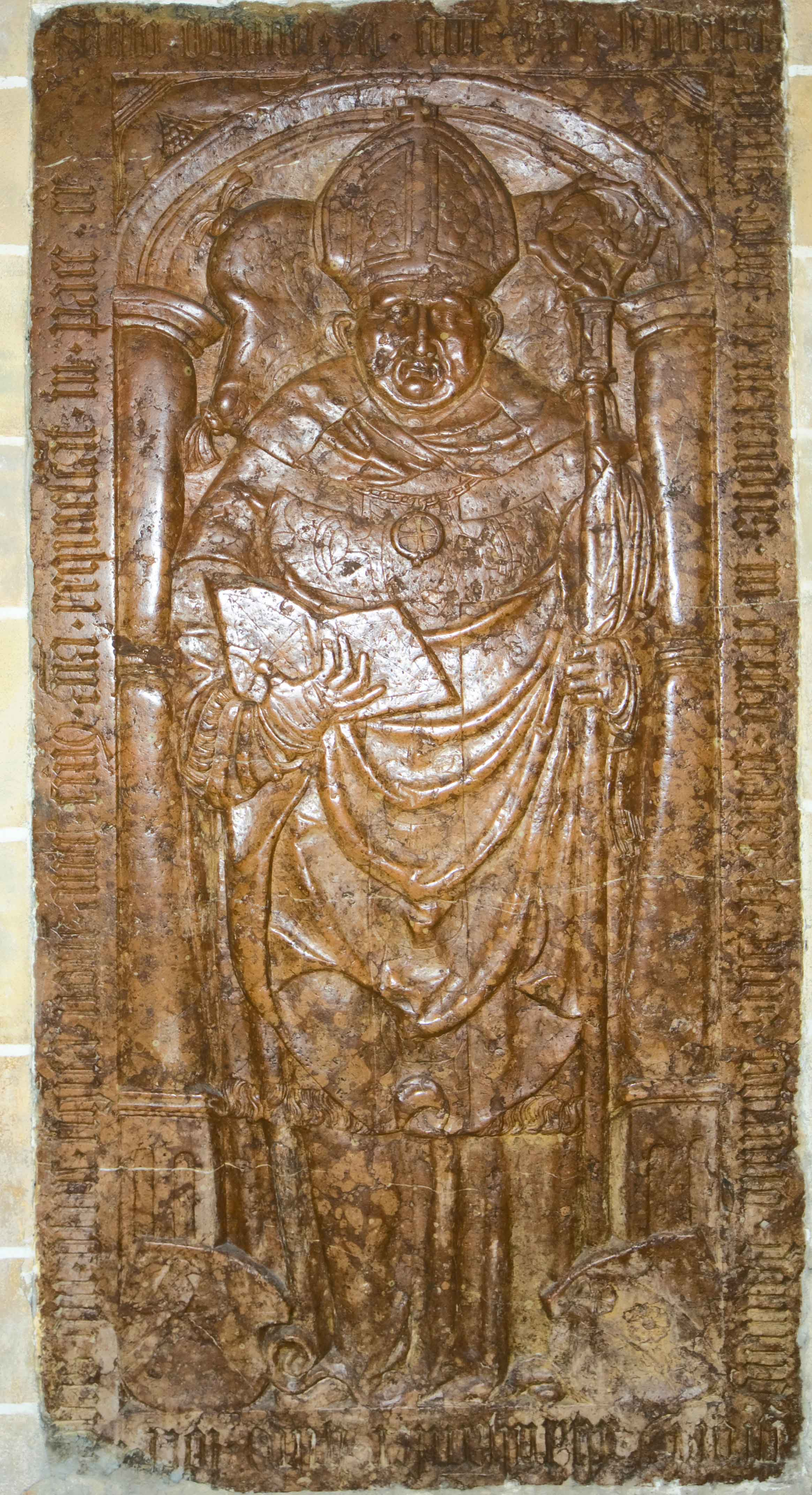 Kloster Walderbach, Grabdeckplatte Westflügel